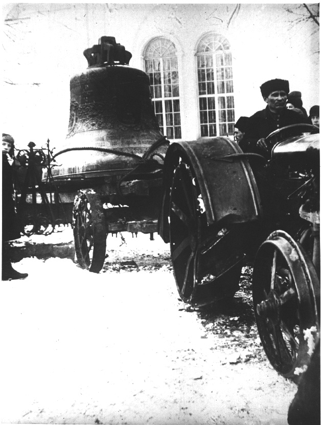 Anti-religious period in Lugansk (Ukraine)